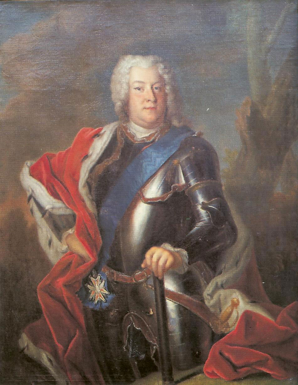 Беларуская (тарашкевіца): Партрэт Якуба Генрыка Флемінга